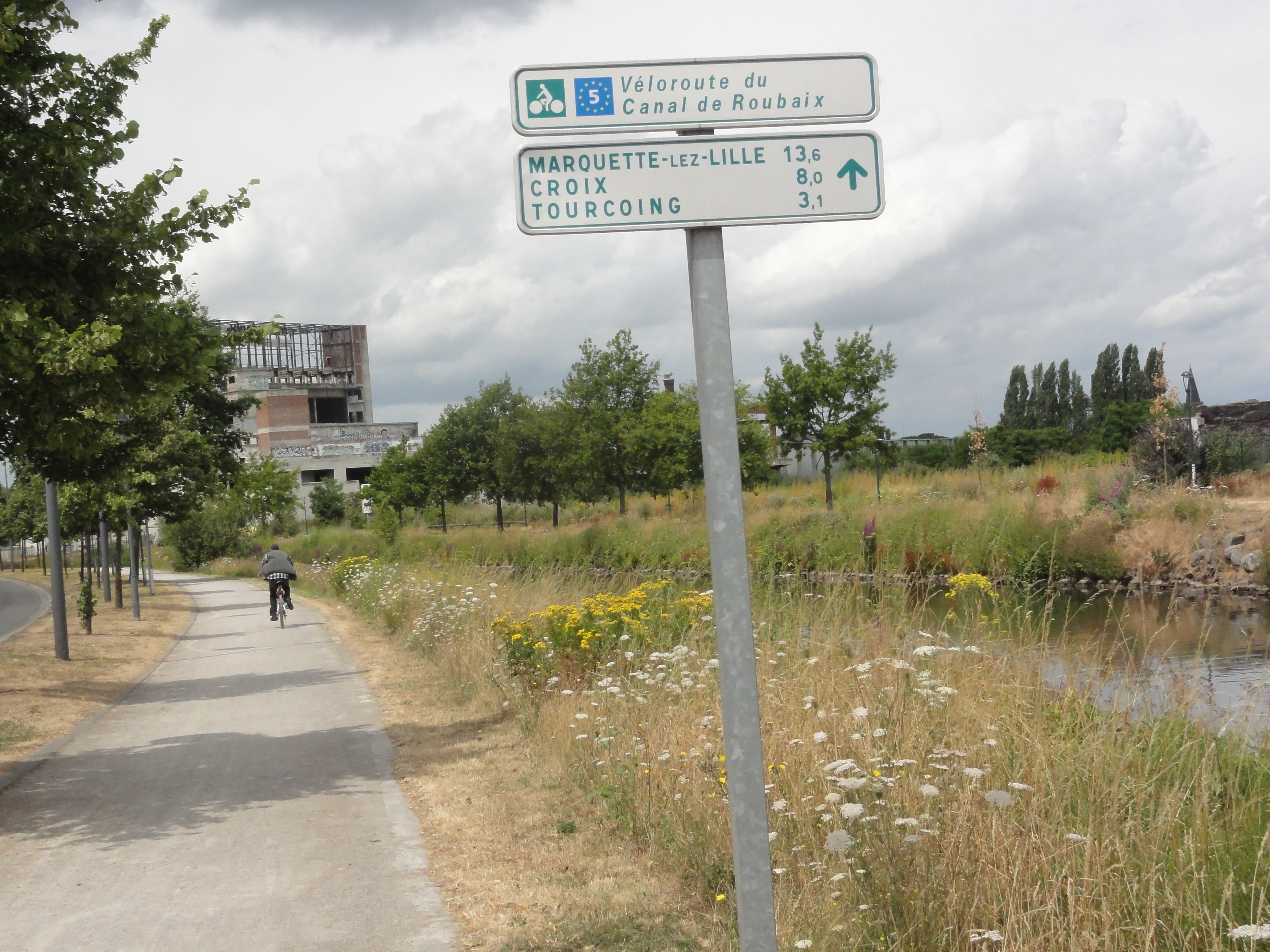 Roubaix (Nord) Véloroute du Canal de Roubaix